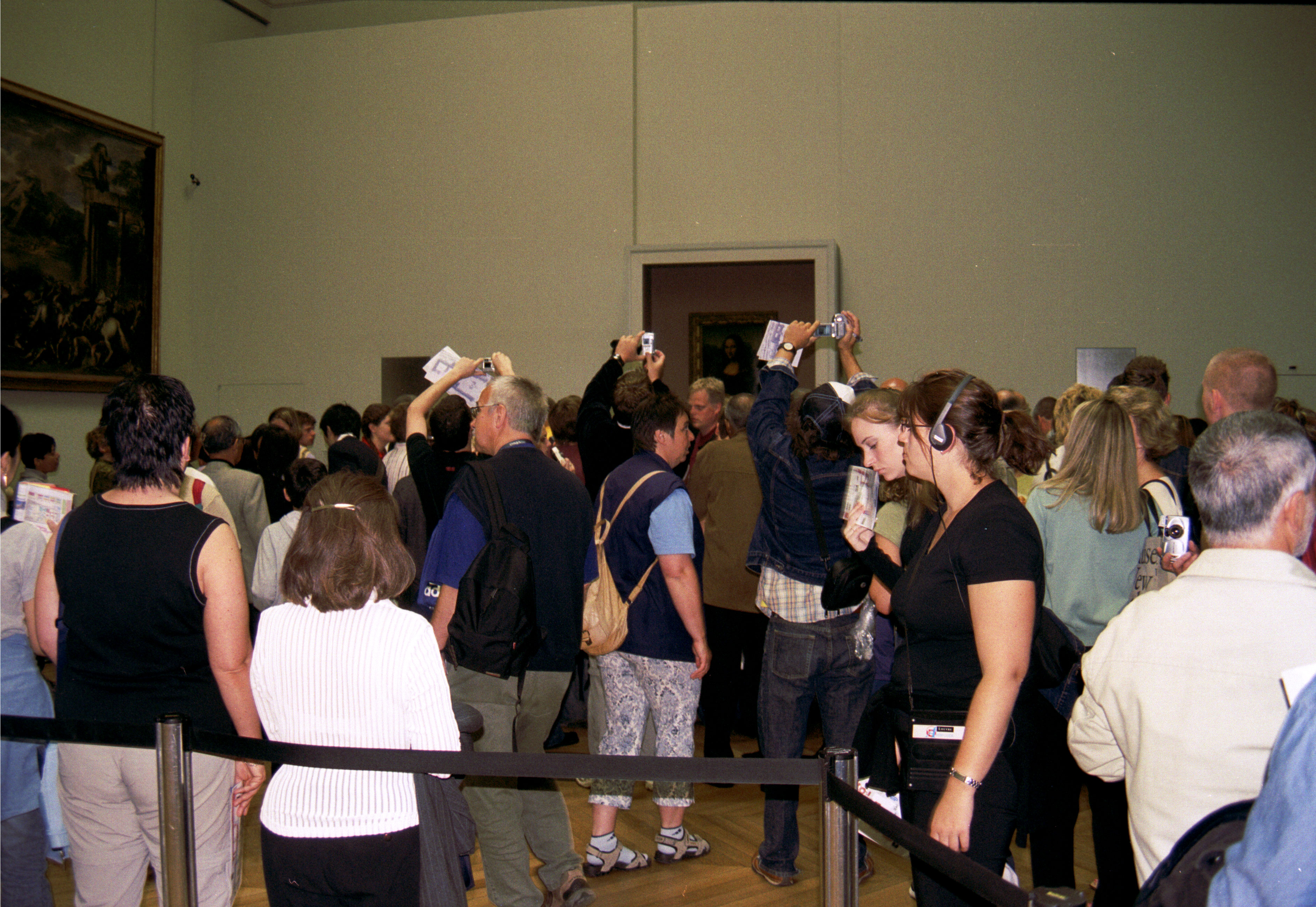 People in the Louvre watching (?) and taking pictures of the Mona Lisa painting